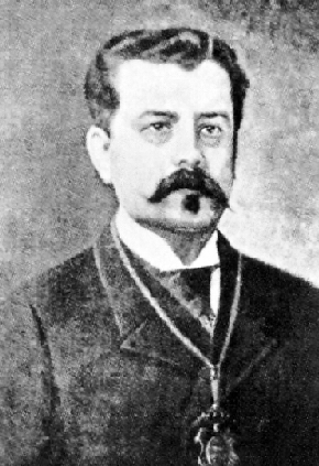 Cipriano Coronel Zegarra (1809-1969) diplomático y político peruano, natural de Tacna. Diputado y Ministro de Estado.